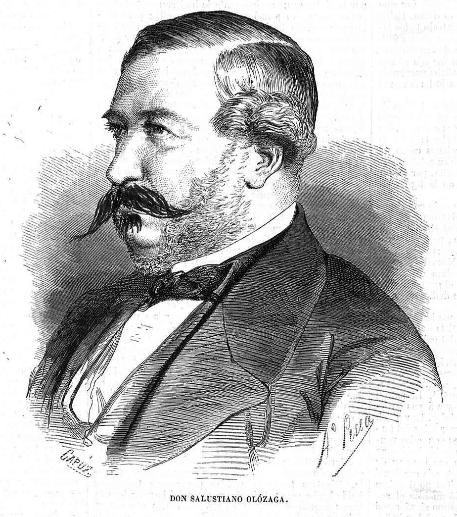 «Don Salustiano Olózaga», en la revista española El Museo Universal.